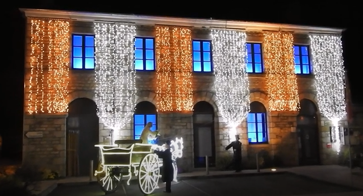 La mairie de Ceaucé décorée pour les fêtes de fin d'année